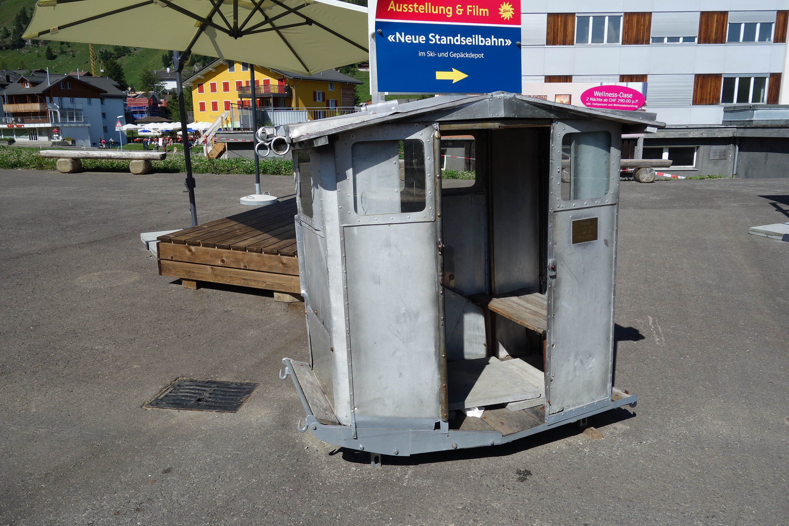 Luftseilbahn Morschach–Stoos SZ, Schweiz